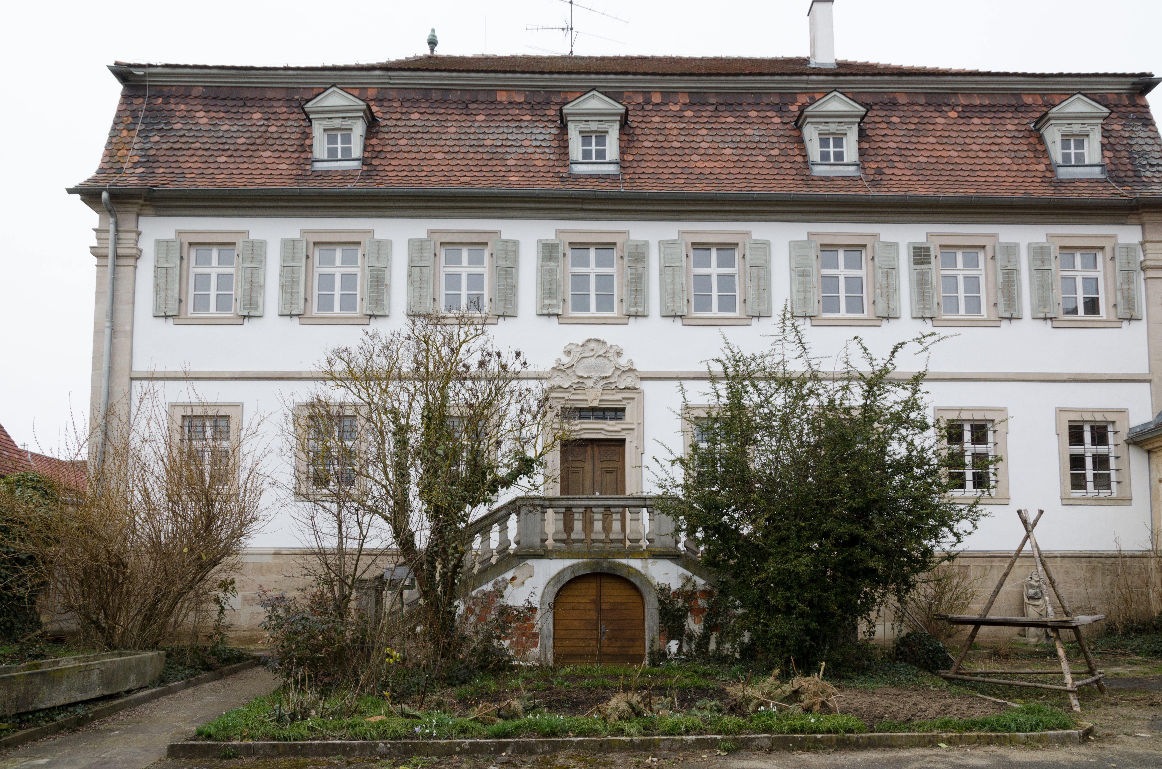 Obertheres, Bundesstraße 17